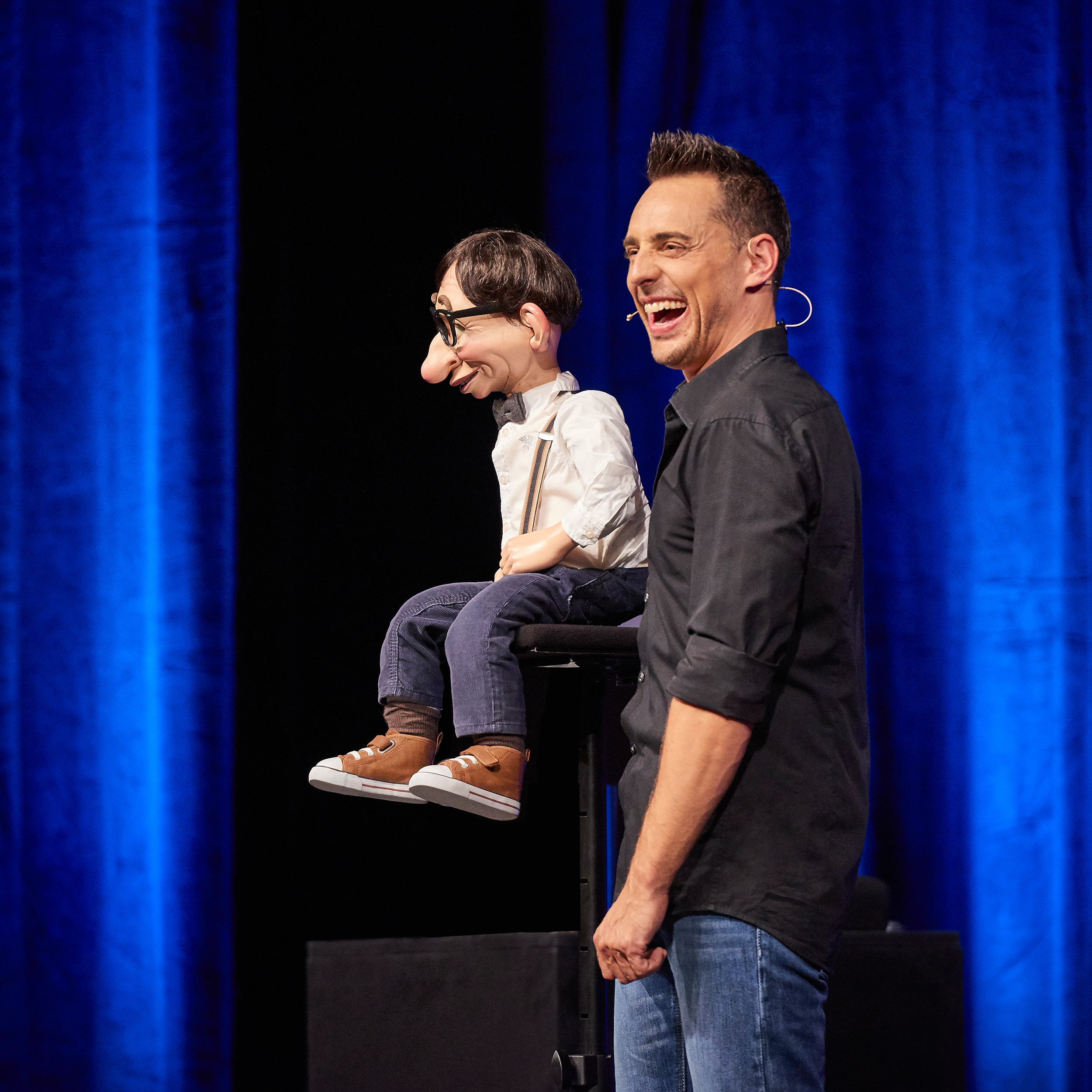 Tricky Niki "PartnerTausch", Hannover 2016